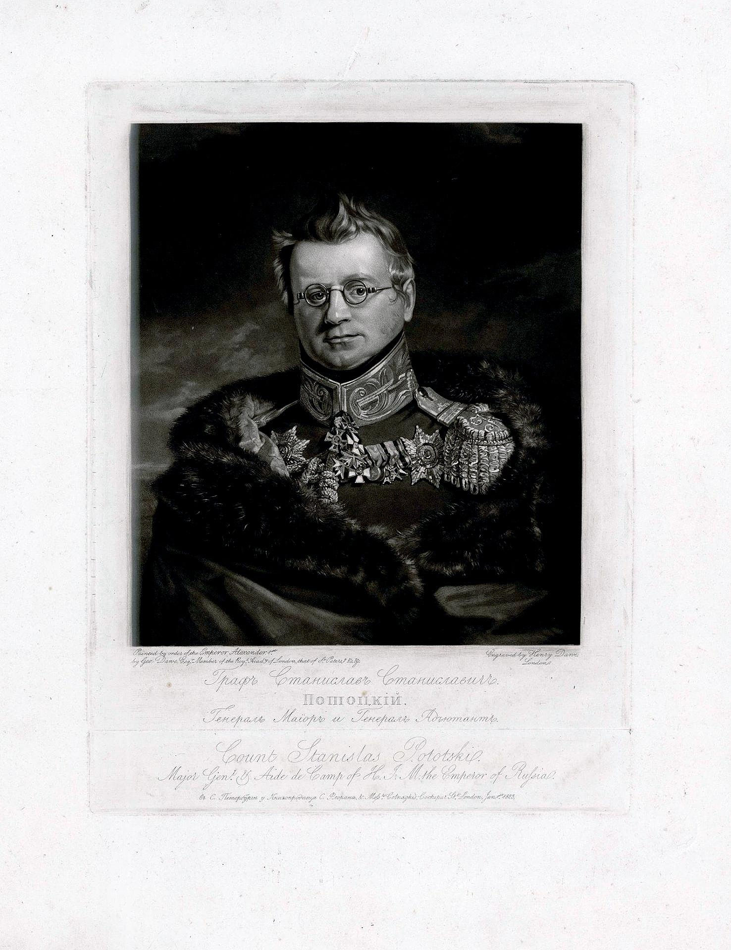 Портрет генерала С. С. Потоцкого